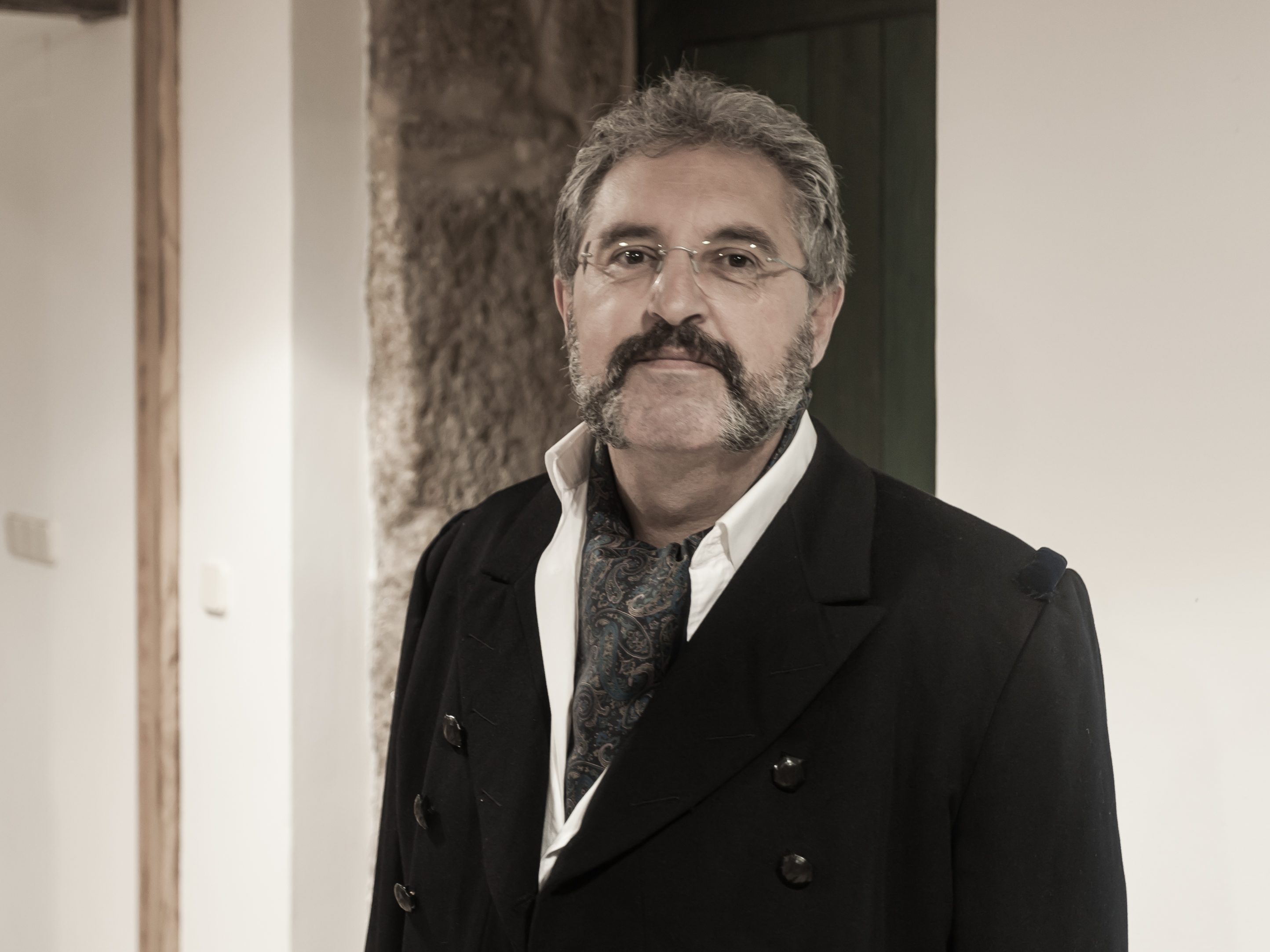 Xosé Manuel Fernández Castro (Pepes) actuando nunha curtametraxe de Marisa Otero. Cachosenande, Galiuza